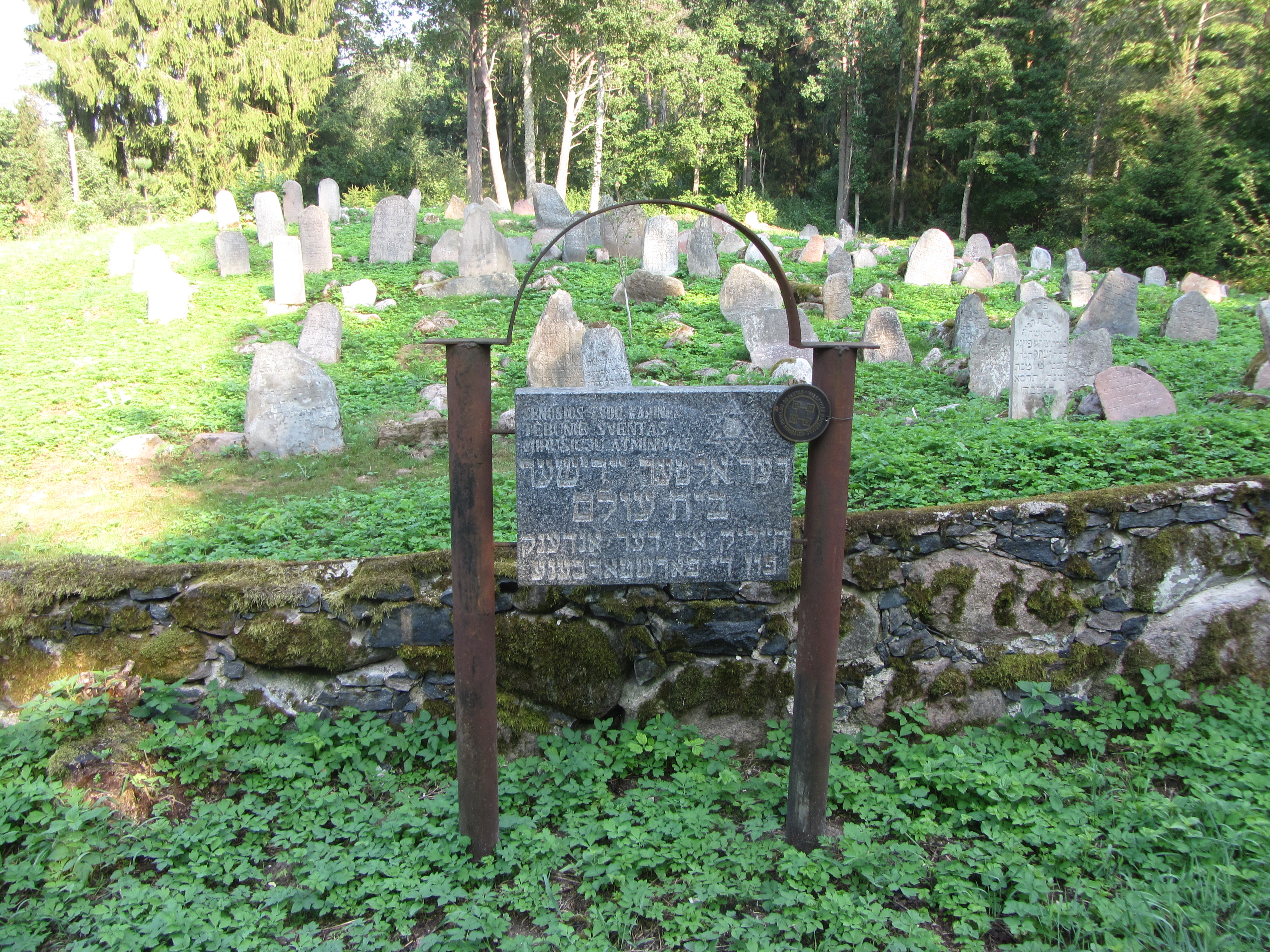 Tauragnų sen., Lithuania